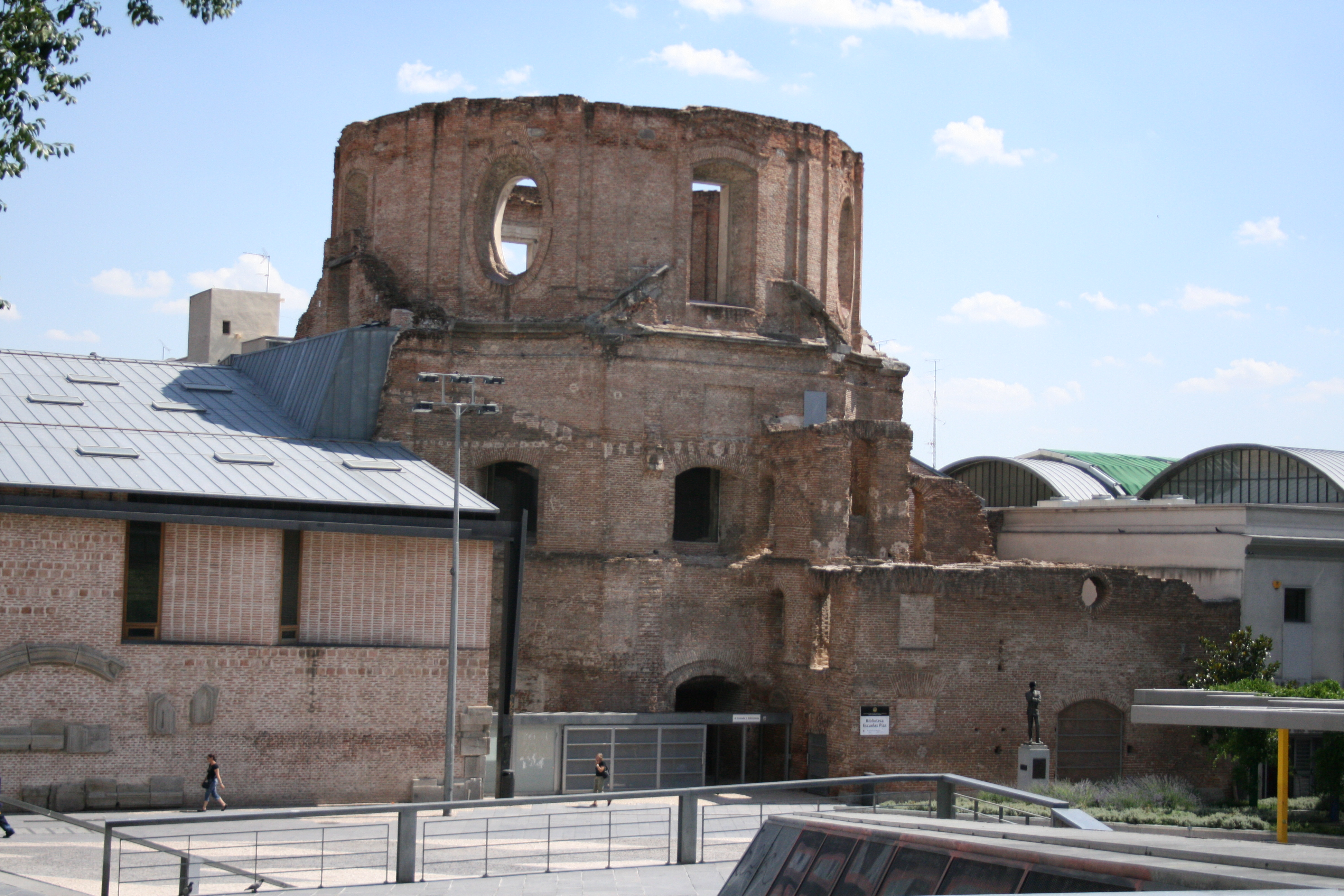 Lavapies escuelas pias